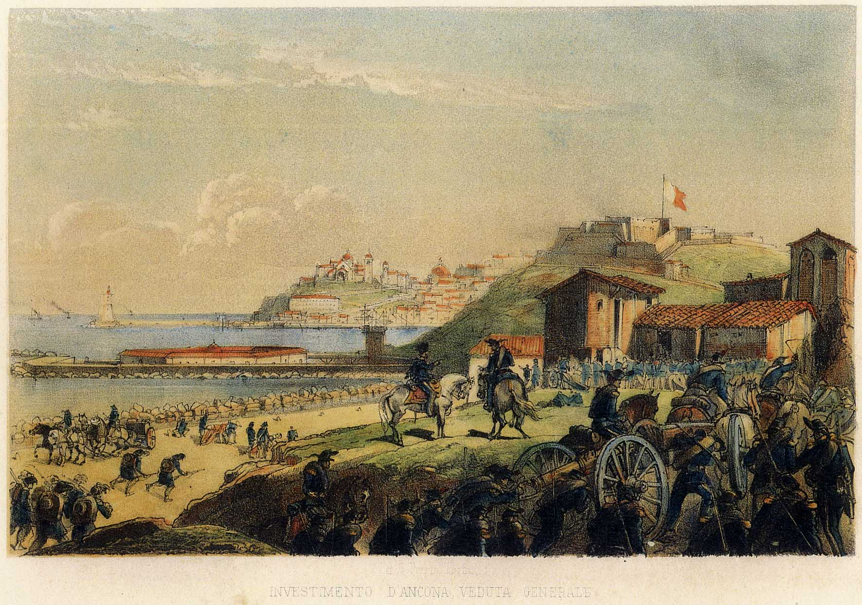 occupazione d'Ancona, veduta generale. Litografia a colori, 228 x 148 mm